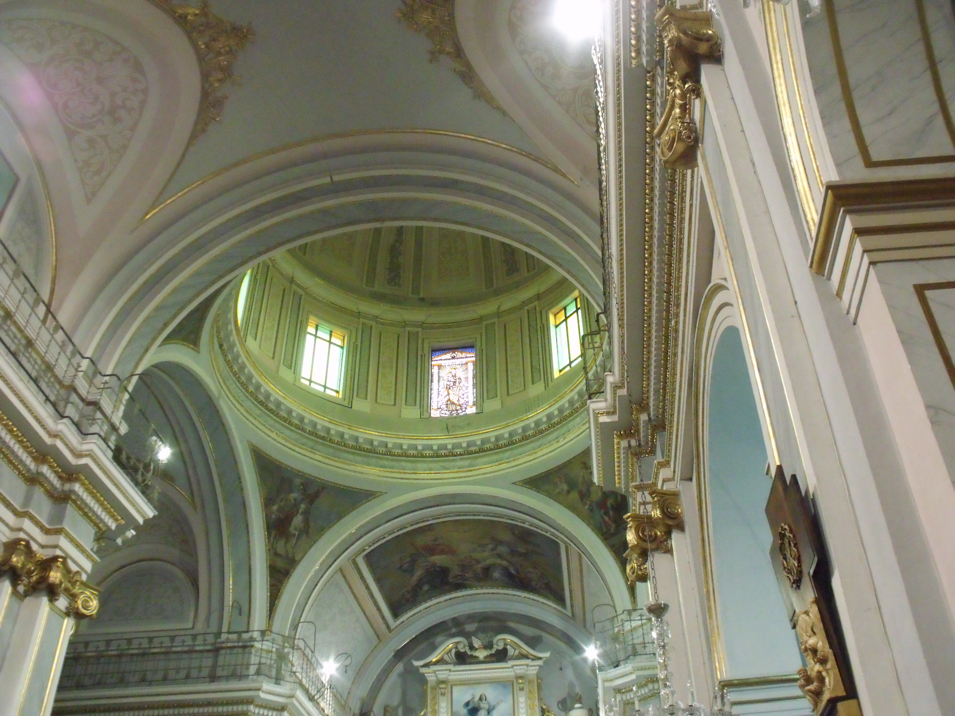 Cúpula central de la nave central de la Iglesia Parroquial Alcàsser